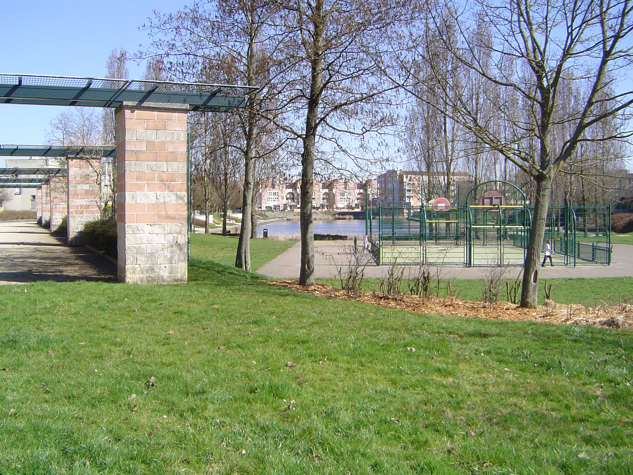 Photos prises à Lognes, commune française de Seine-et-Marne